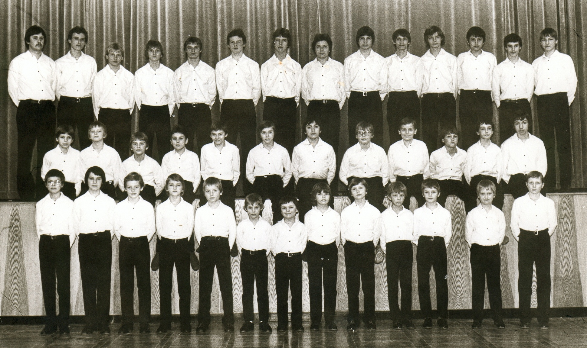 Original image description from the Deutsche FotothekKnabenchor d. Pionierchor "August Bebel" Zwickau während eines Aufenthaltes im ZPL